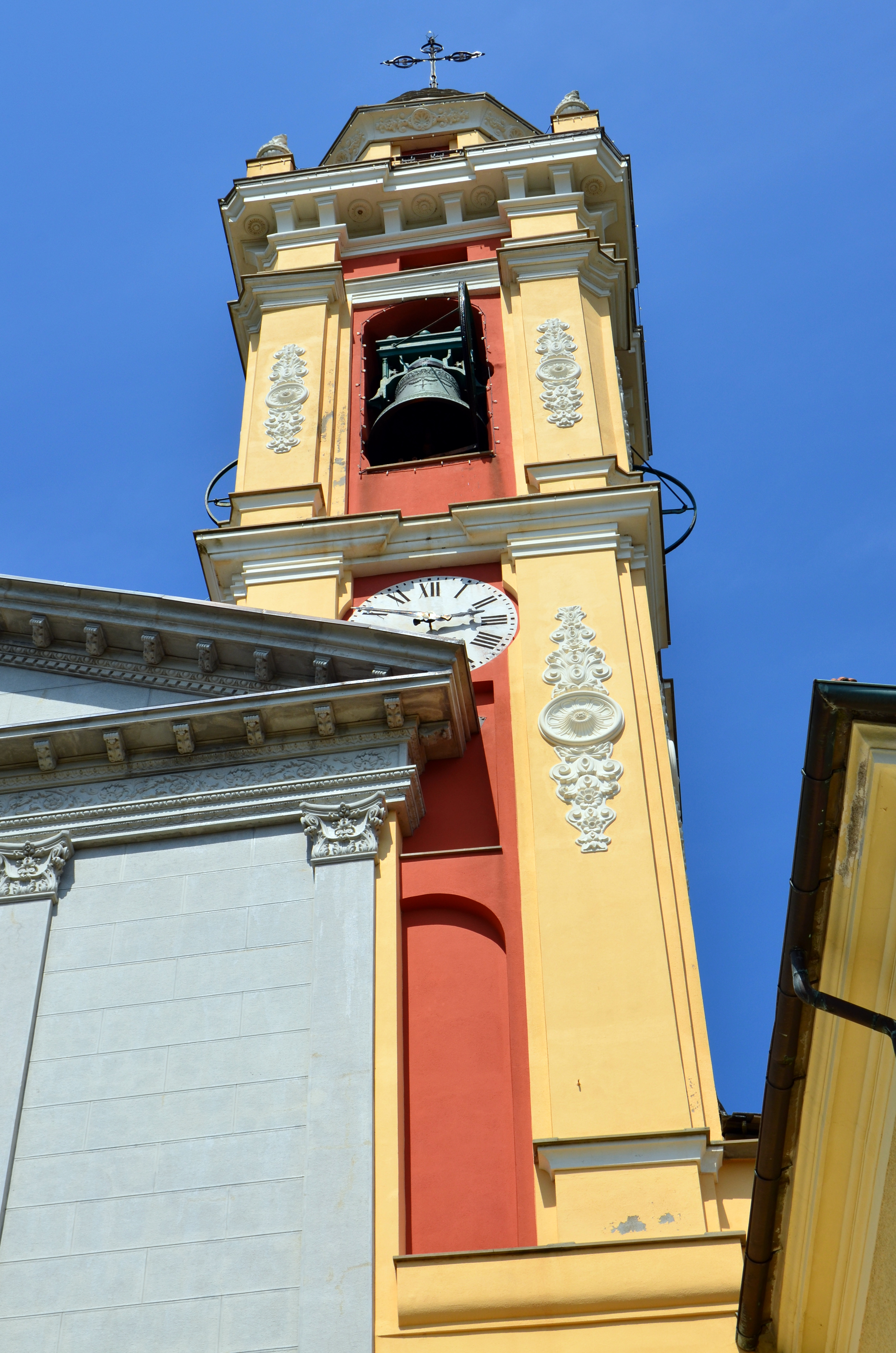 Il campanile della chiesa di San Rufino, San Rufino, Leivi, Liguria, Italia